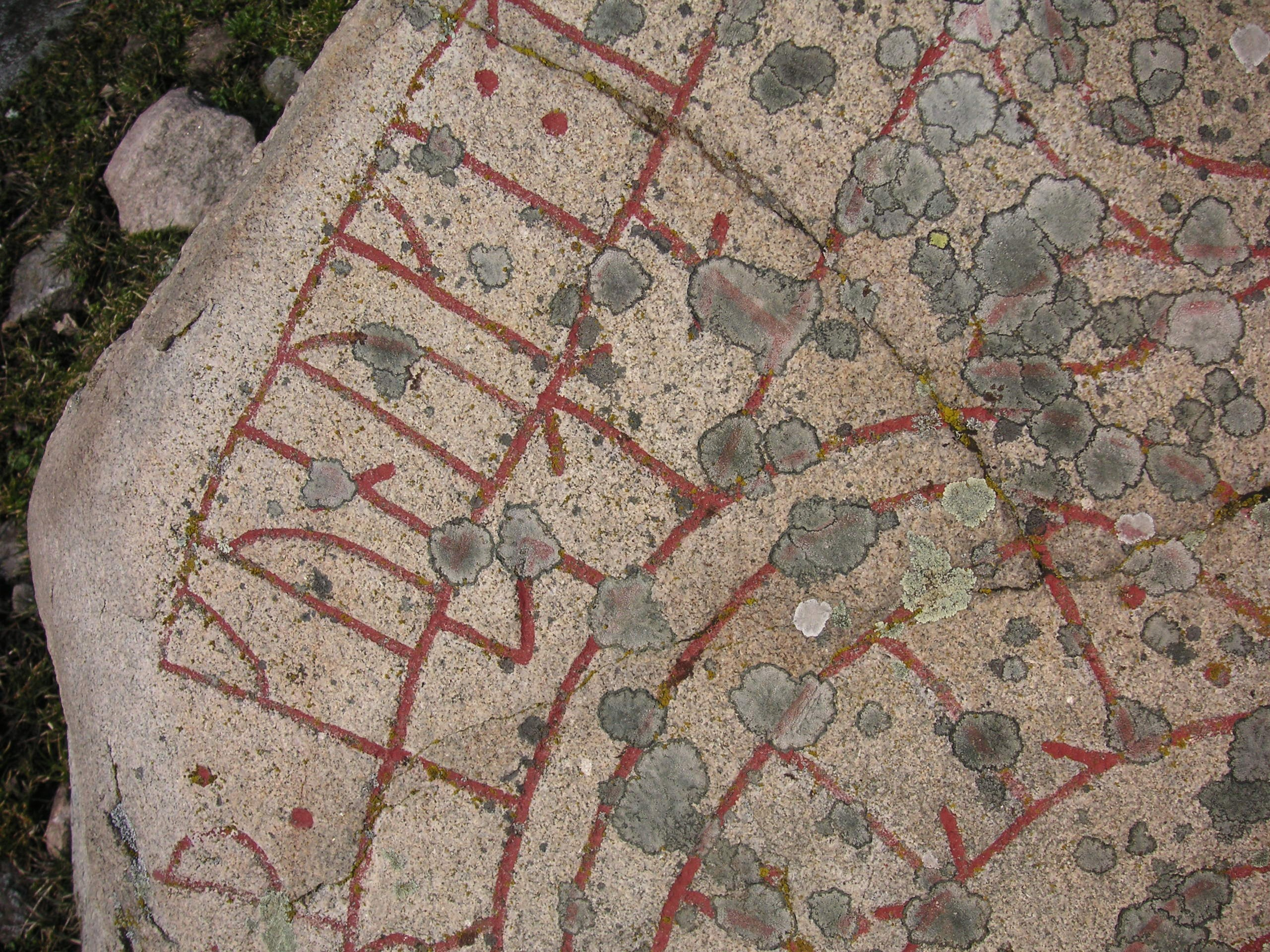 Hovegården på Adelsön, runsten "Håkanstenen", detalj